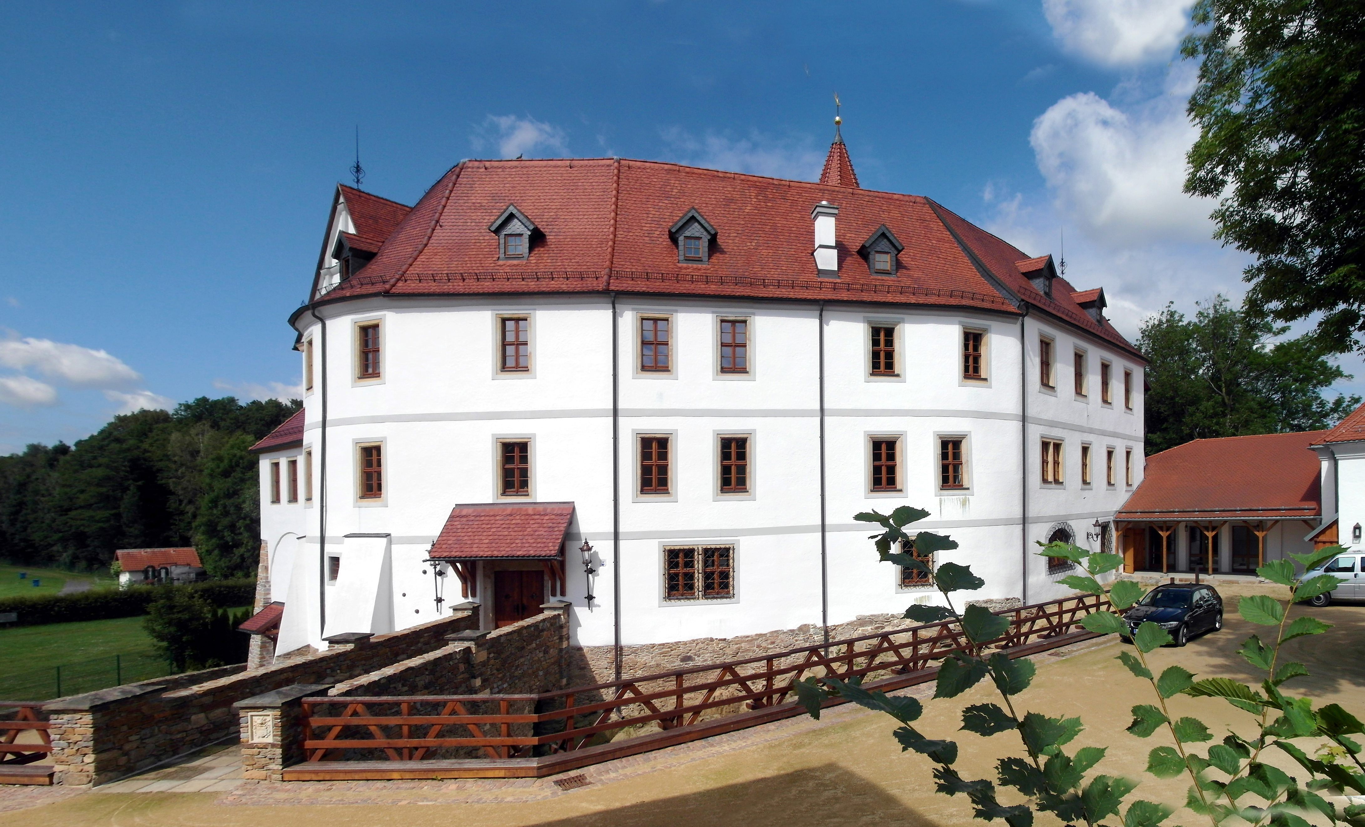 18.07.2016 09600 Weißenborn, Frauensteiner Str. 8 (GMP: 50.872061,13.399188): Schloß, Frauensteiner Straße 8. Sicht von NO. Burg vermutlich aus slawischen Zeit. 1213 erstmals erwähnt. Ab 1365 für 13 Generationen im Besitz der Familie Hartitzsch. Danach viele Besitzerwechsel. Anlage im Wesentlichen spätgotisch, 16. - 17. Jh. mit späteren Umbauten. In der DDR war das Schloß Kulturhaus des VEB Papierfabrik Weißenborn. Arzt-, Bibliotheks- und Wohnräume wurden geschaffen und 1954 der Kulturhaussaal angebaut. Seit 2002 Privatbesitz der Familie Graff Pehrson Vesterager. Umfassend saniert. Nicht mehr öffentlich zugänglich. [SAM6920+6925.JPG]20160718100MDR.JPG(c)Blobelt